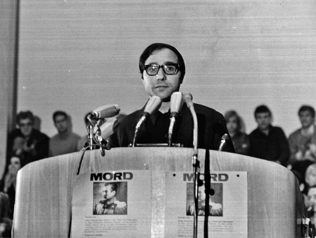 Ludwig Binder: Studentenrevolte 1967/68, West-Berlin; veröffentlicht vom Haus der Geschichte der Bundesrepublik Deutschland